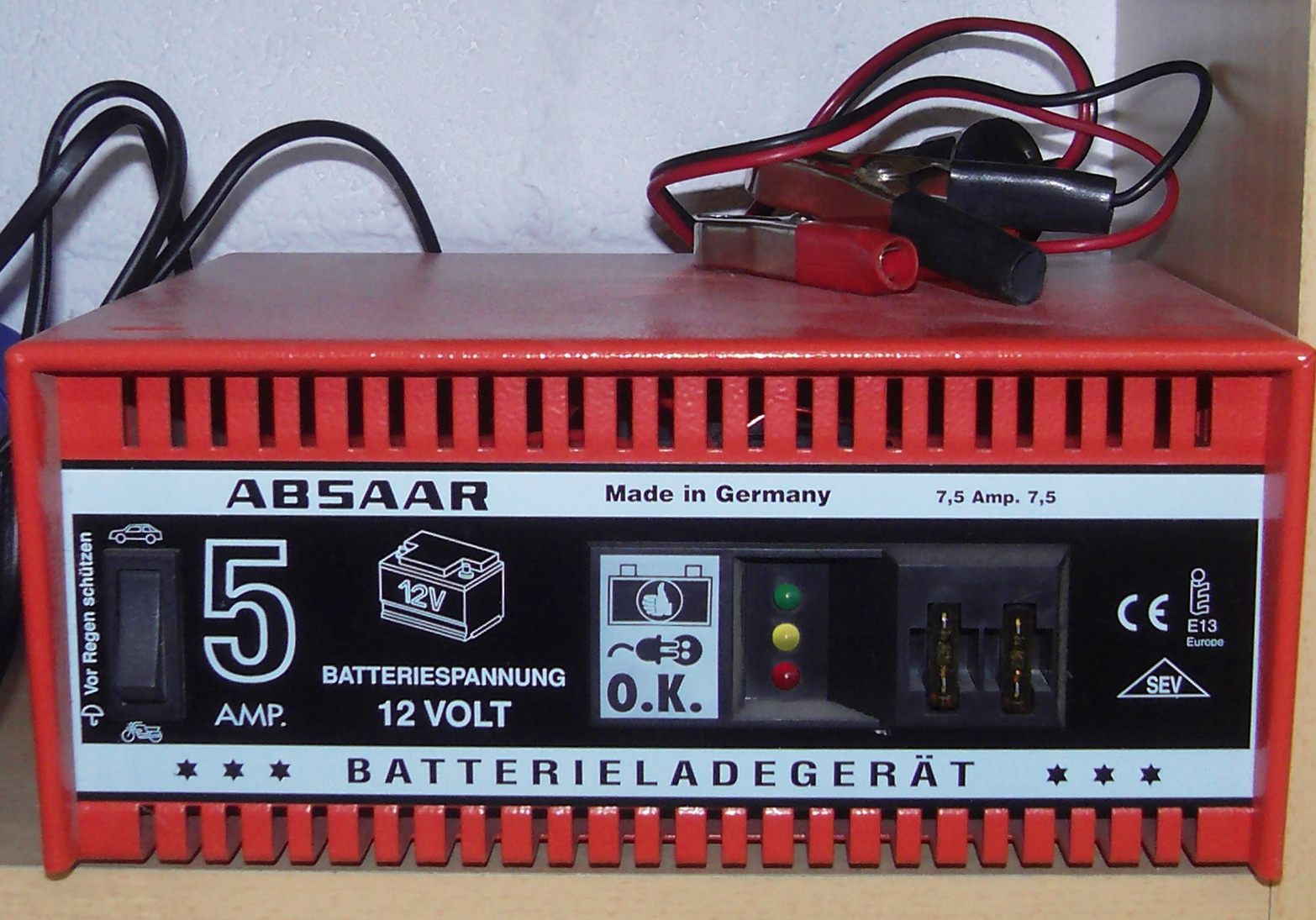 Batterieladegerät; Akkuladegerät 12 V, 5 A ABSAAR